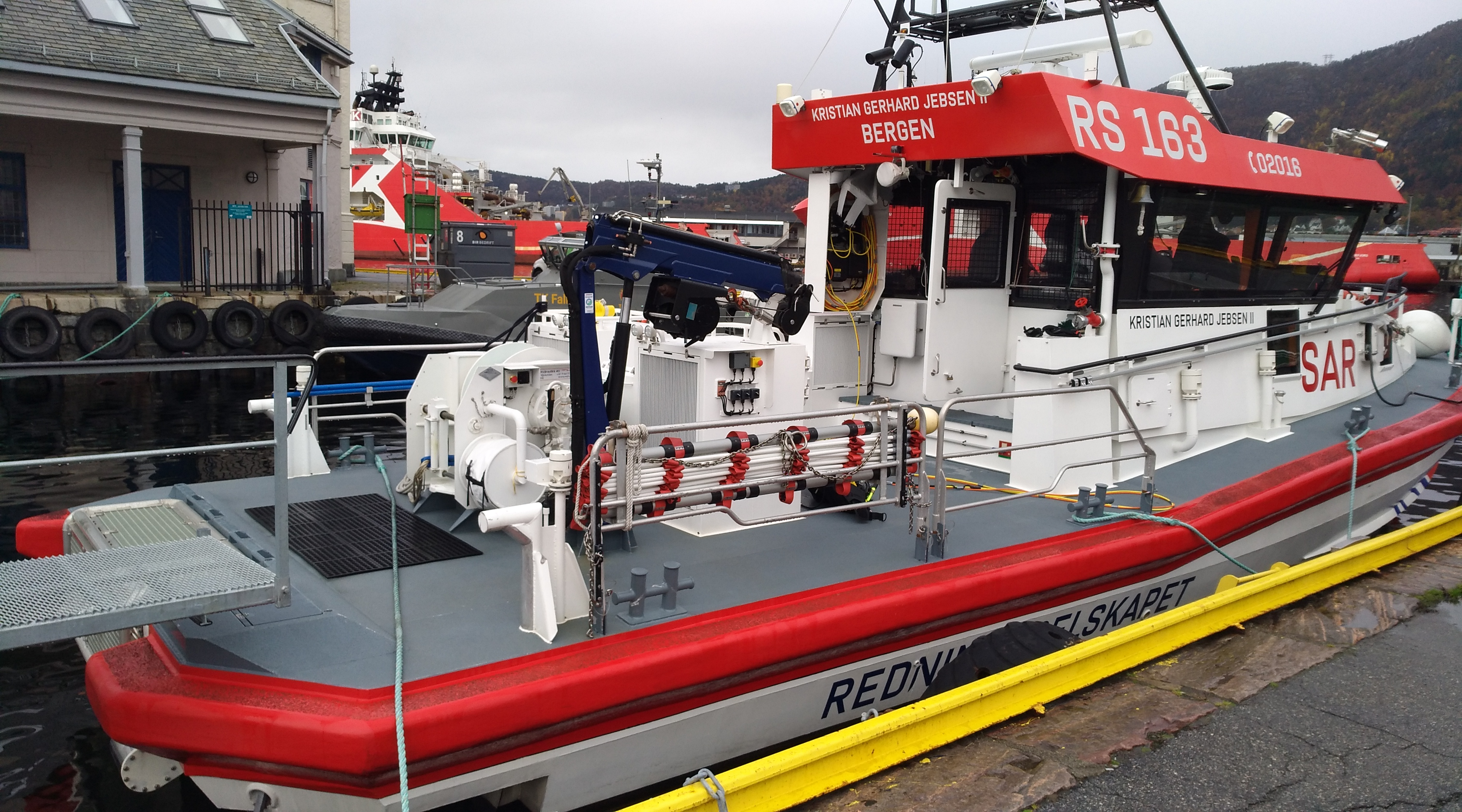 RS 163 Kristian Gerhard Jebsen II - Petter C. G. Sundt-Klasse der NSSR in Bergen